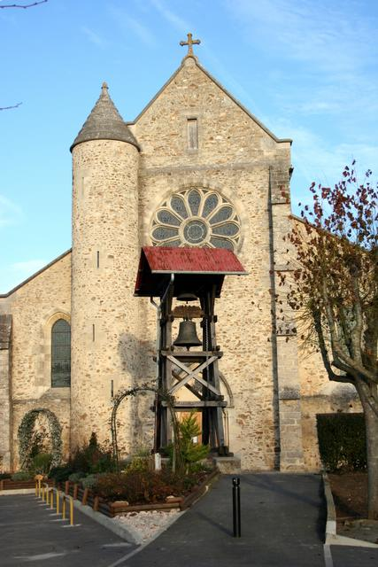 Eglise Saint Rémy à Ferrières-en-Brie (Seine et Marne) Auteur : Philippe Grassion